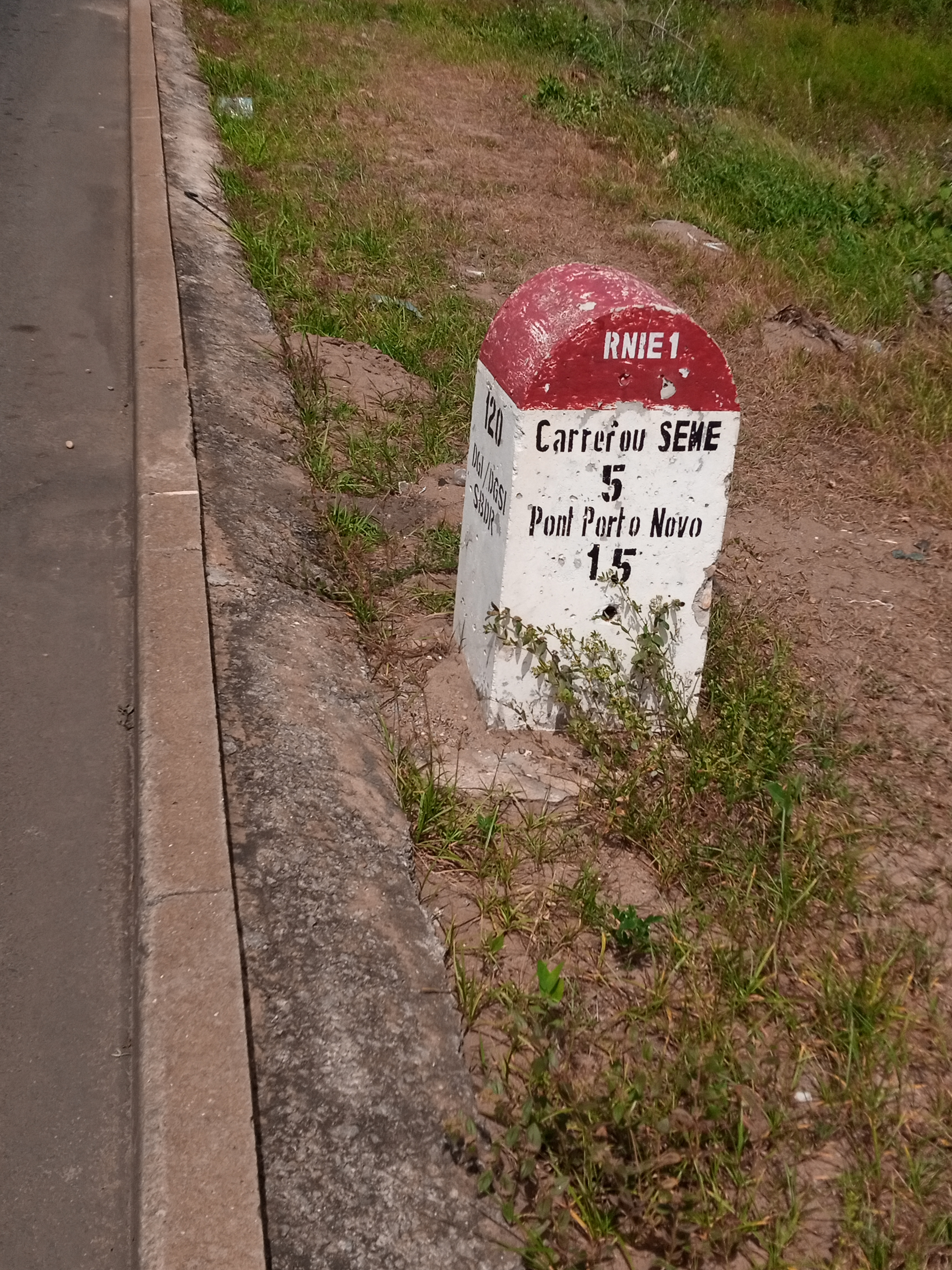 borne kilométrique à Sèmè Podji This is an image with the theme "Africa on the Move or Transport" from: Benin